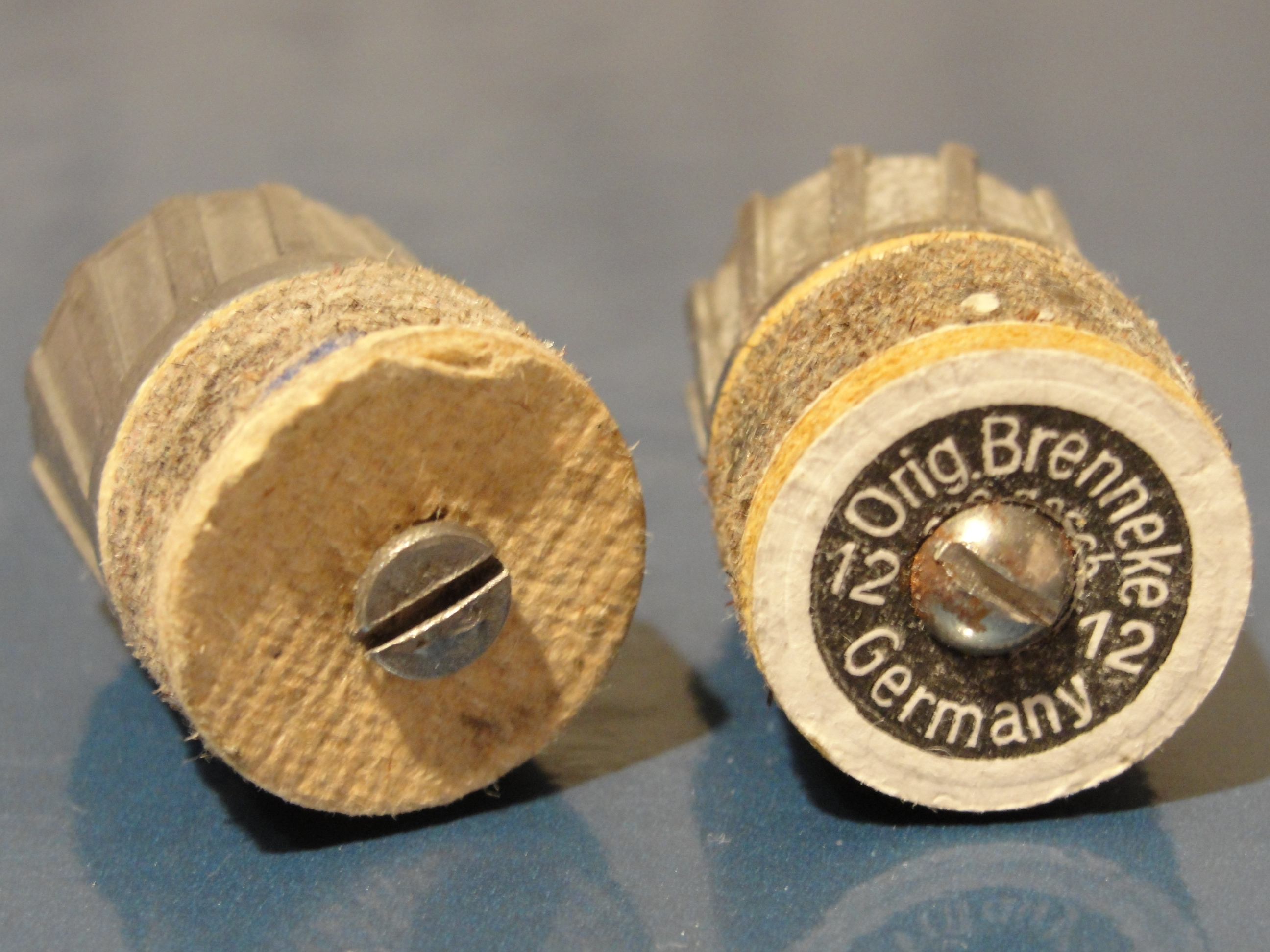 Two Brenneke Slugs, Original and Home-made